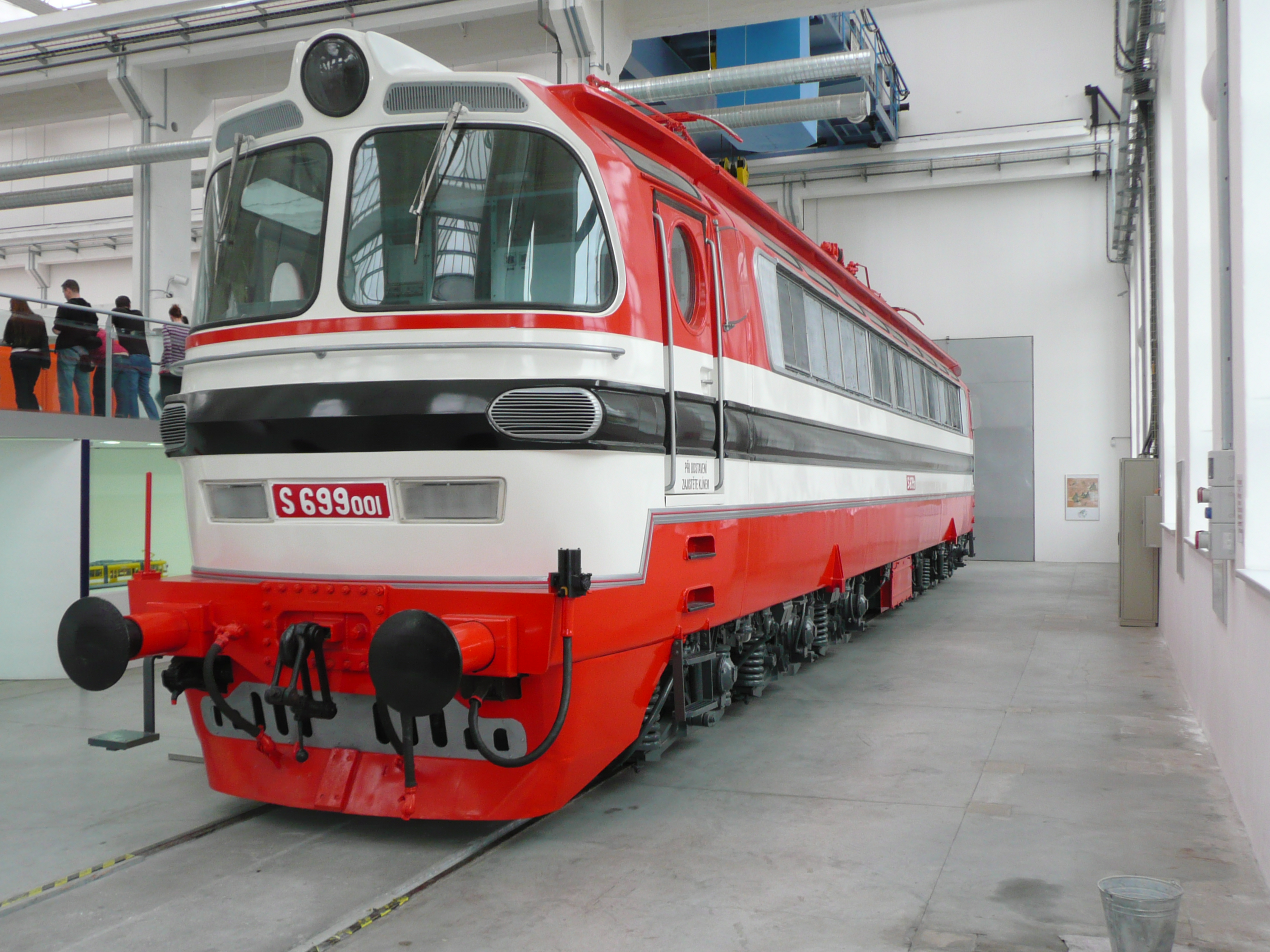 S 699 001 in den Ausstellungshallen von Techmania in Pilsen